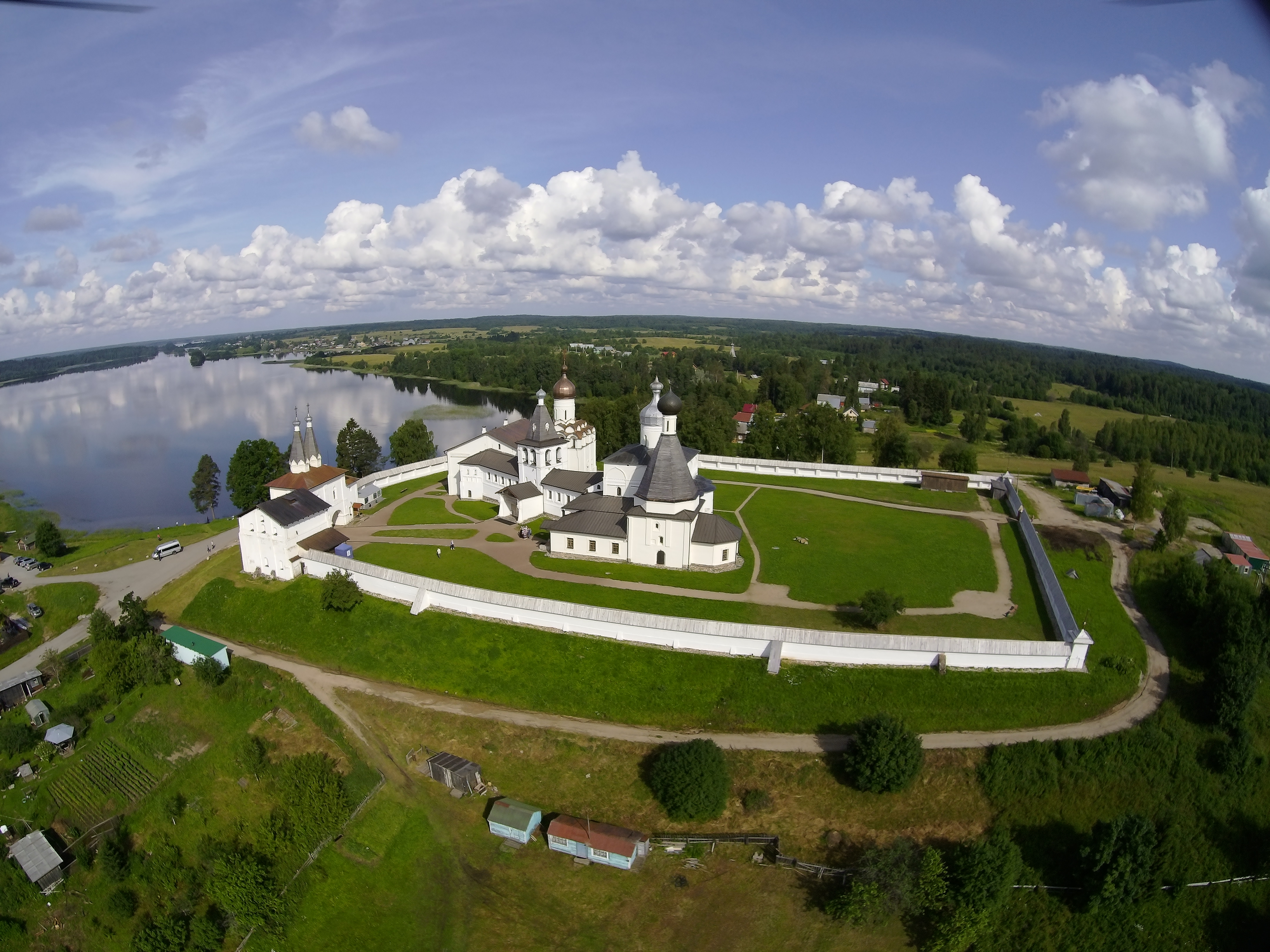 Ферапонтов Белозерский монастырь